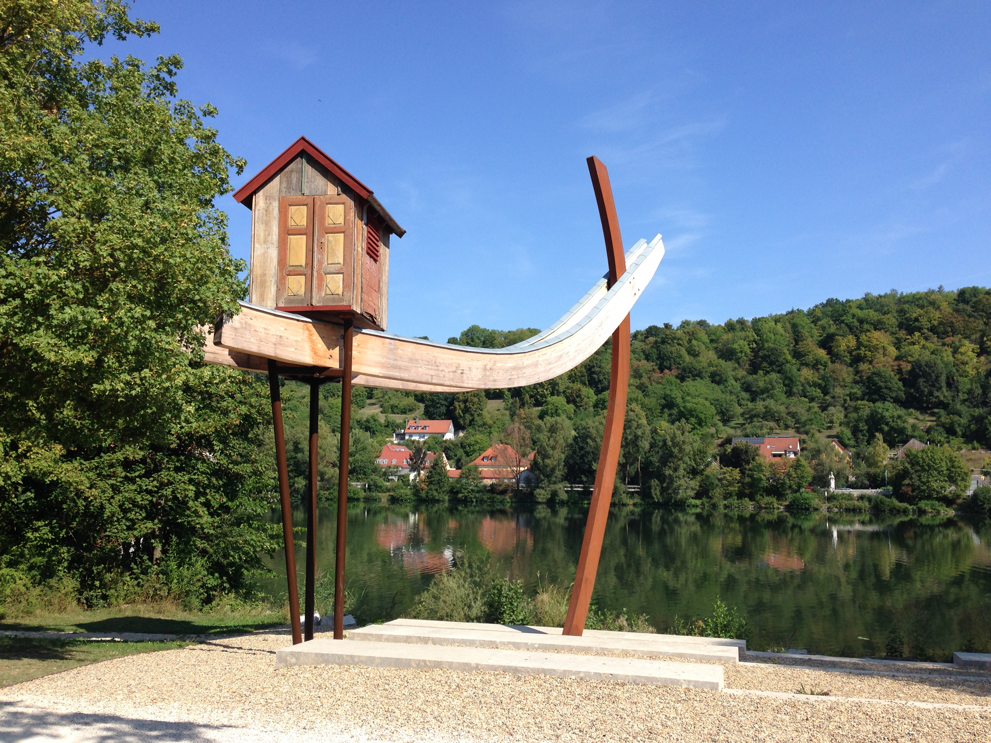 Nördlichster Punkt der Donau am Südufer nahe der Schillerwiese mit Blick auf den Stadtteil Winzer